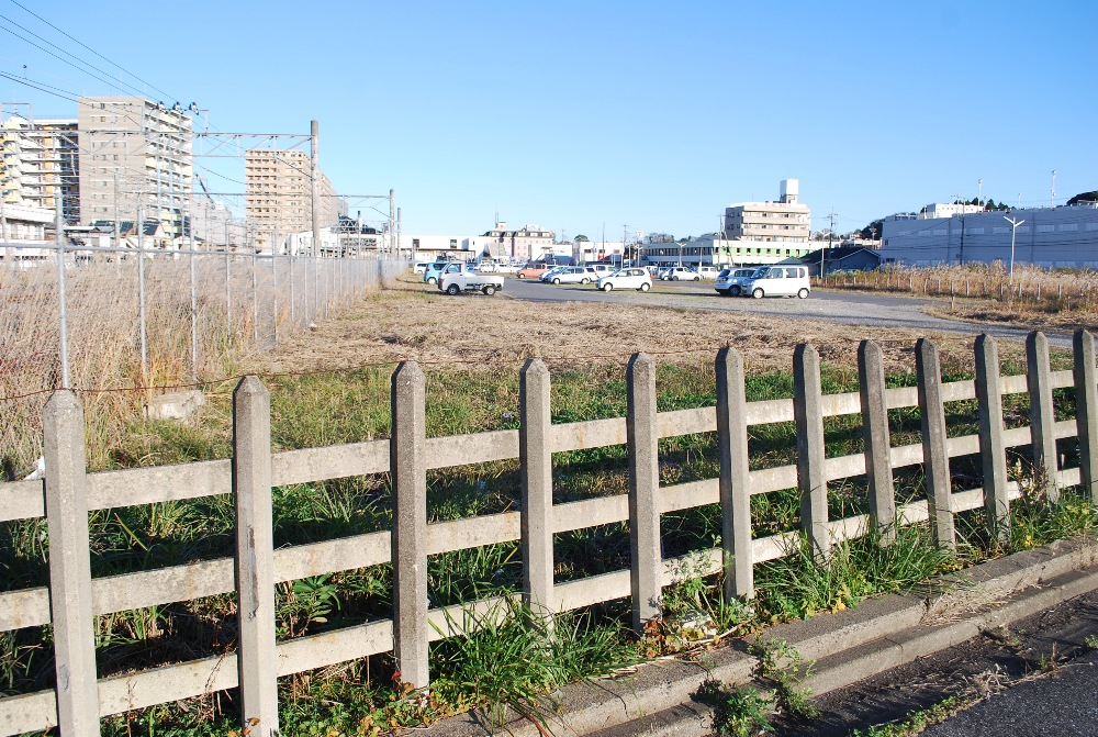 佐倉機関区跡地。JR佐倉駅南側のJR貨物が管理する空き地となっている。この付近に機関庫があった。佐倉市。